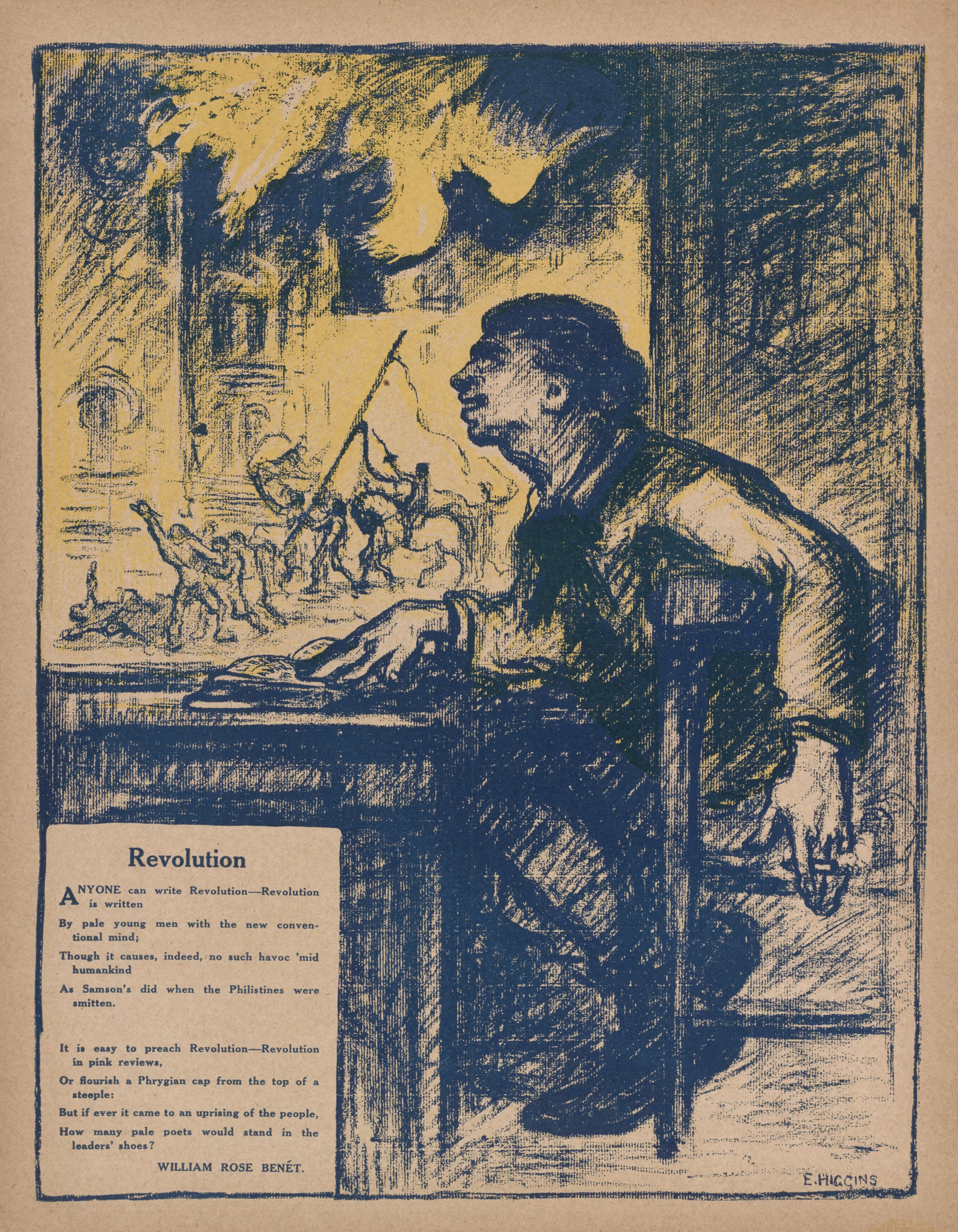 Número de enero de 1916 de The Masses.